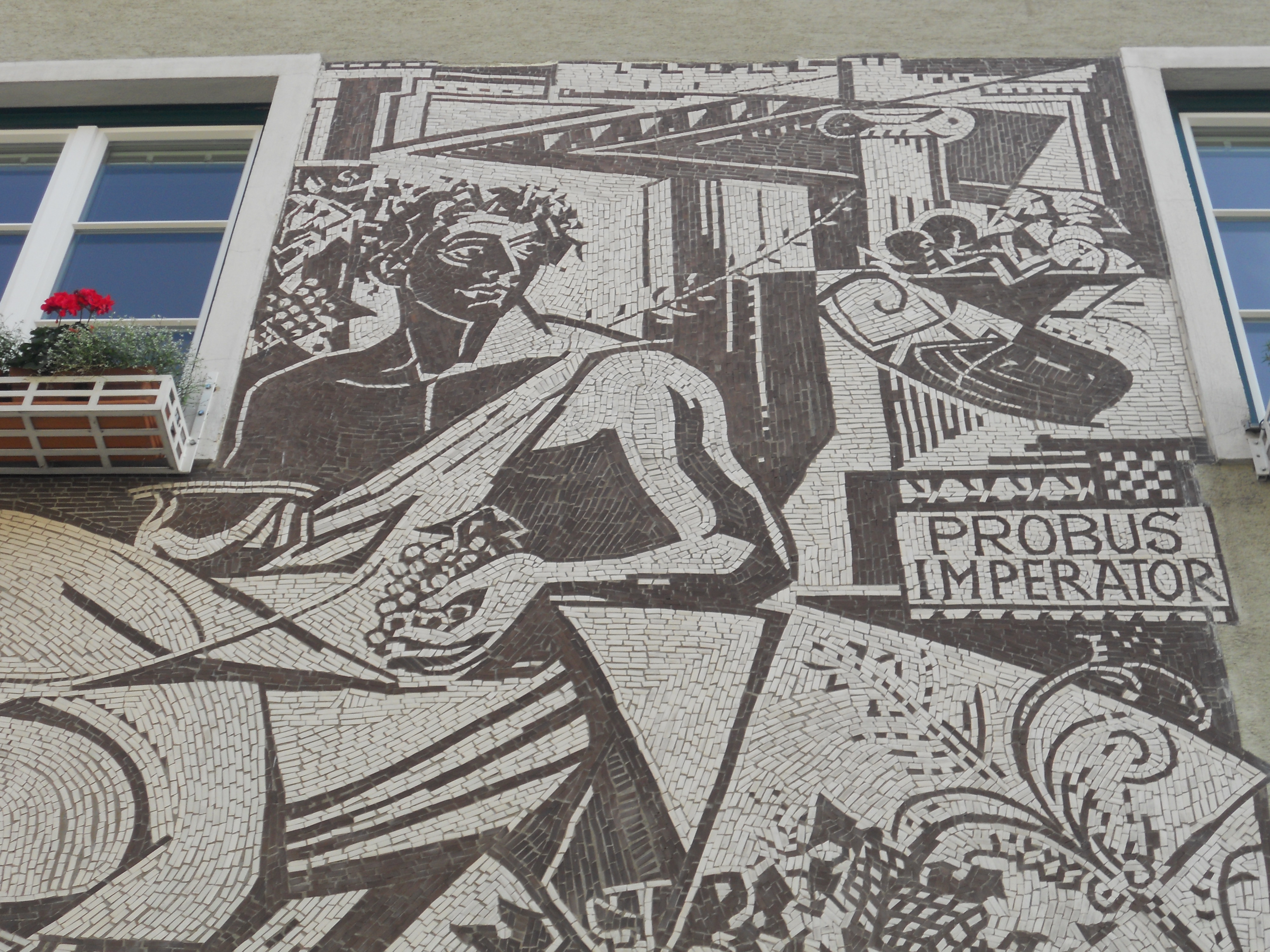 Wohnbau mit Kunst-am-Bau